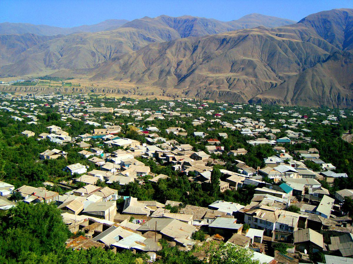 Вид на Ахты сверху